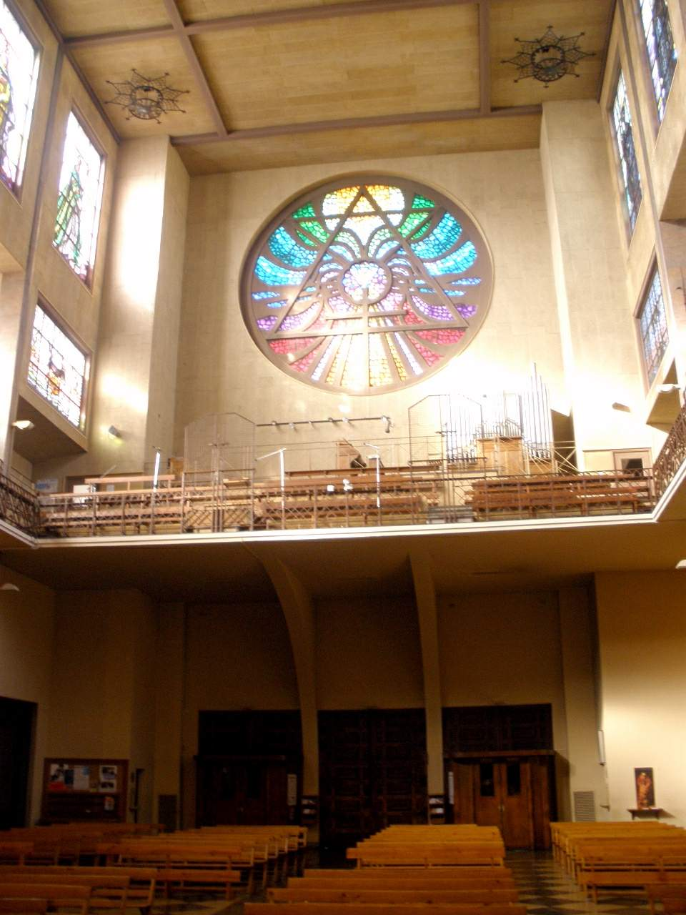 Iglesia de San Francisco Javier (Pamplona)